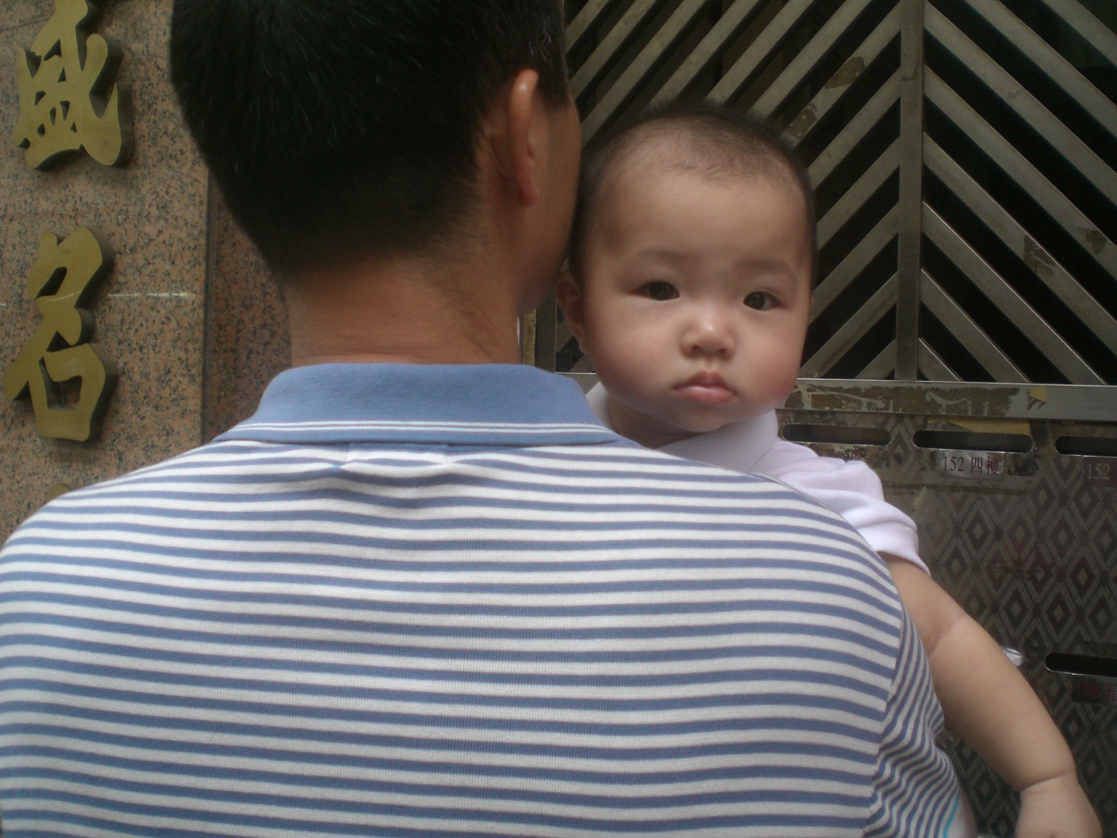 香港人嬰兒